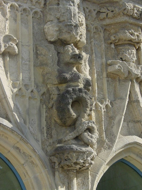 Basilisco de Las Covachas o Las Tiendas de las Sierpes, Sanlúcar de Barrameda (España)